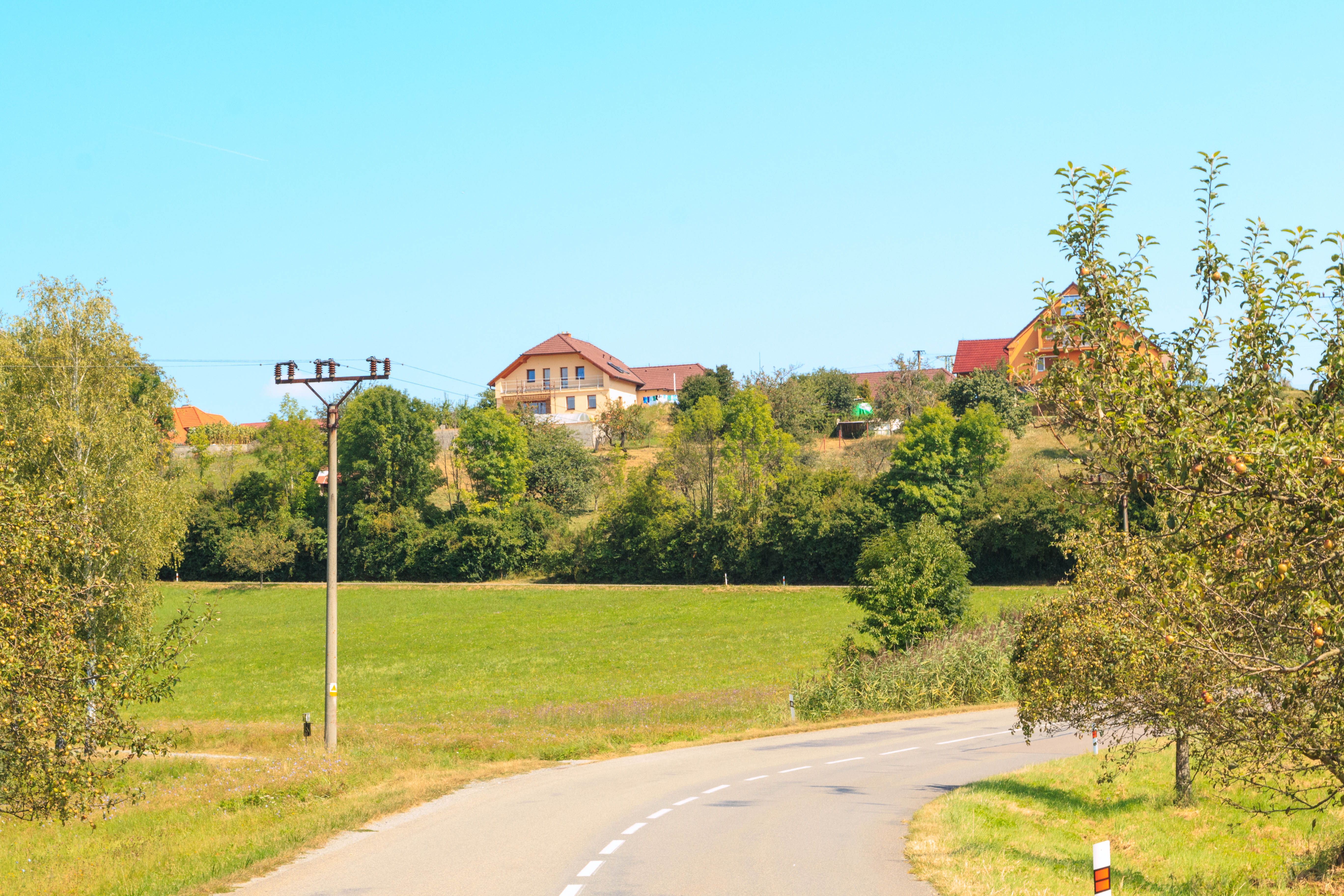 Voletice pohled od Luže